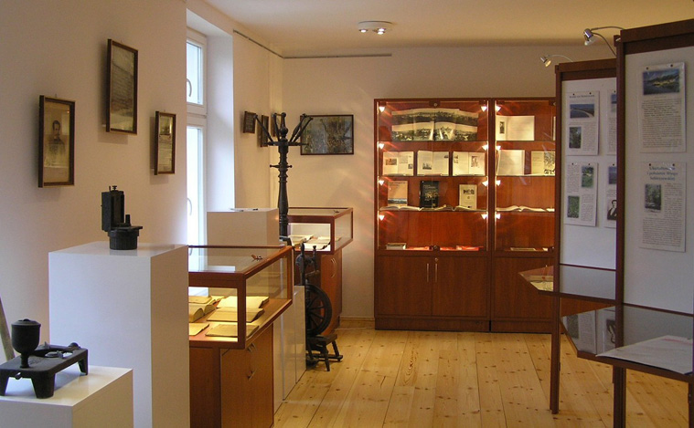 Izba Pamięci Wincentego Pola w Sobieszewie • materiały archiwalne